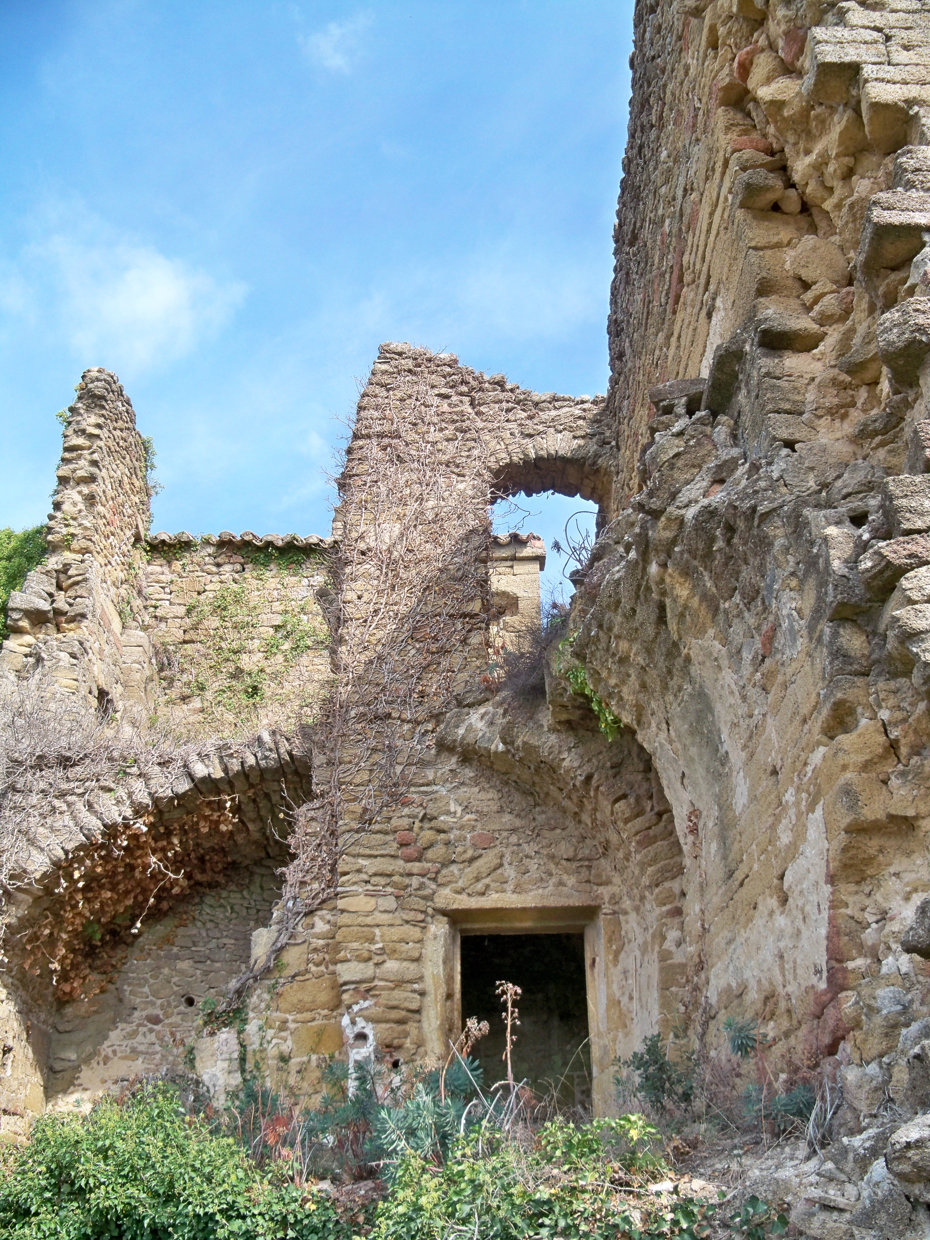 Chapelle Notre-Dame-des-Aubagnons, (Inscription, 1926) : bâtiment annexe .